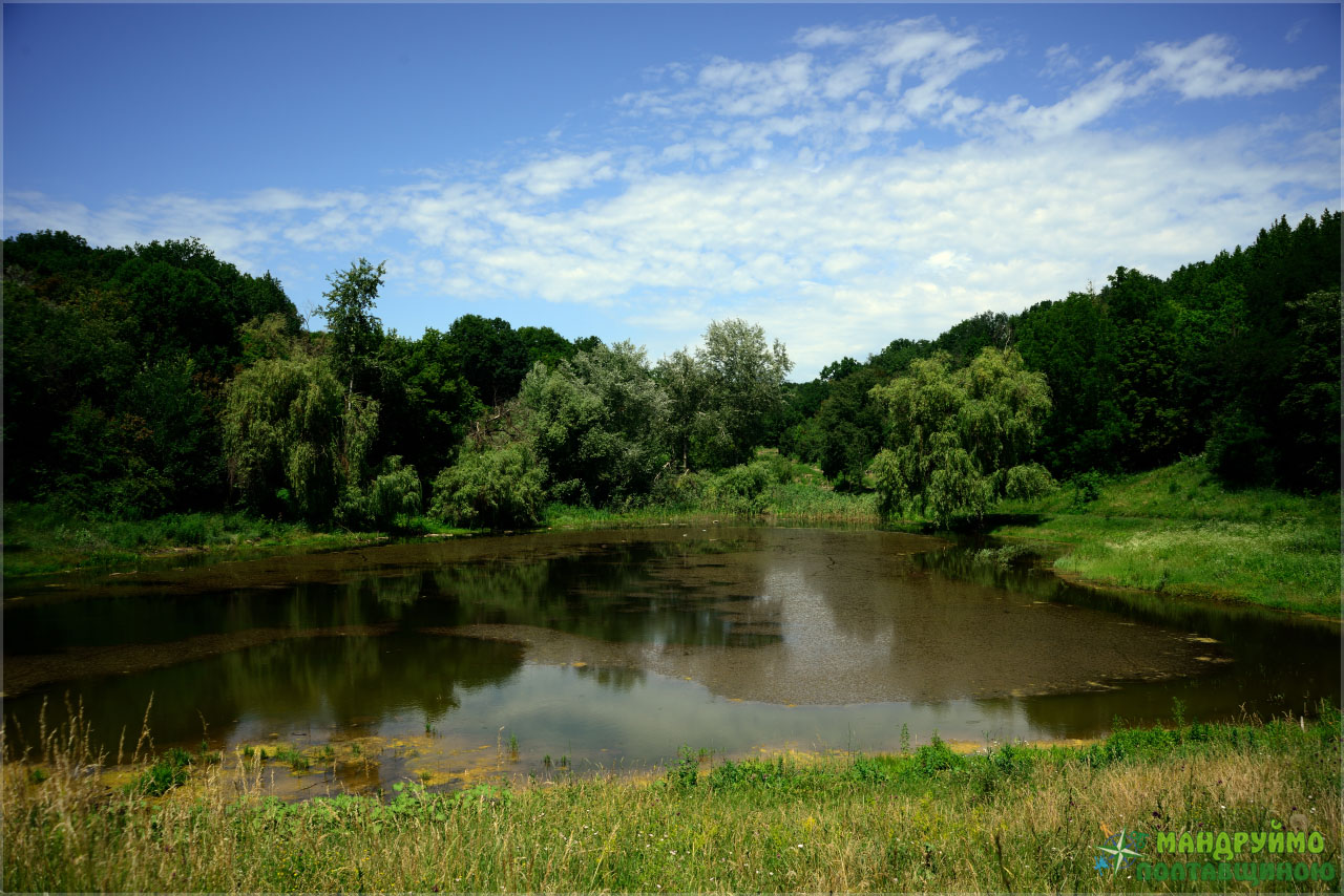 фотографії зроблені під час велоекскурсії, яку організувала ГО "ВелоПолтава" спільно з ПМЕГО «МАМА-86-Полтава»